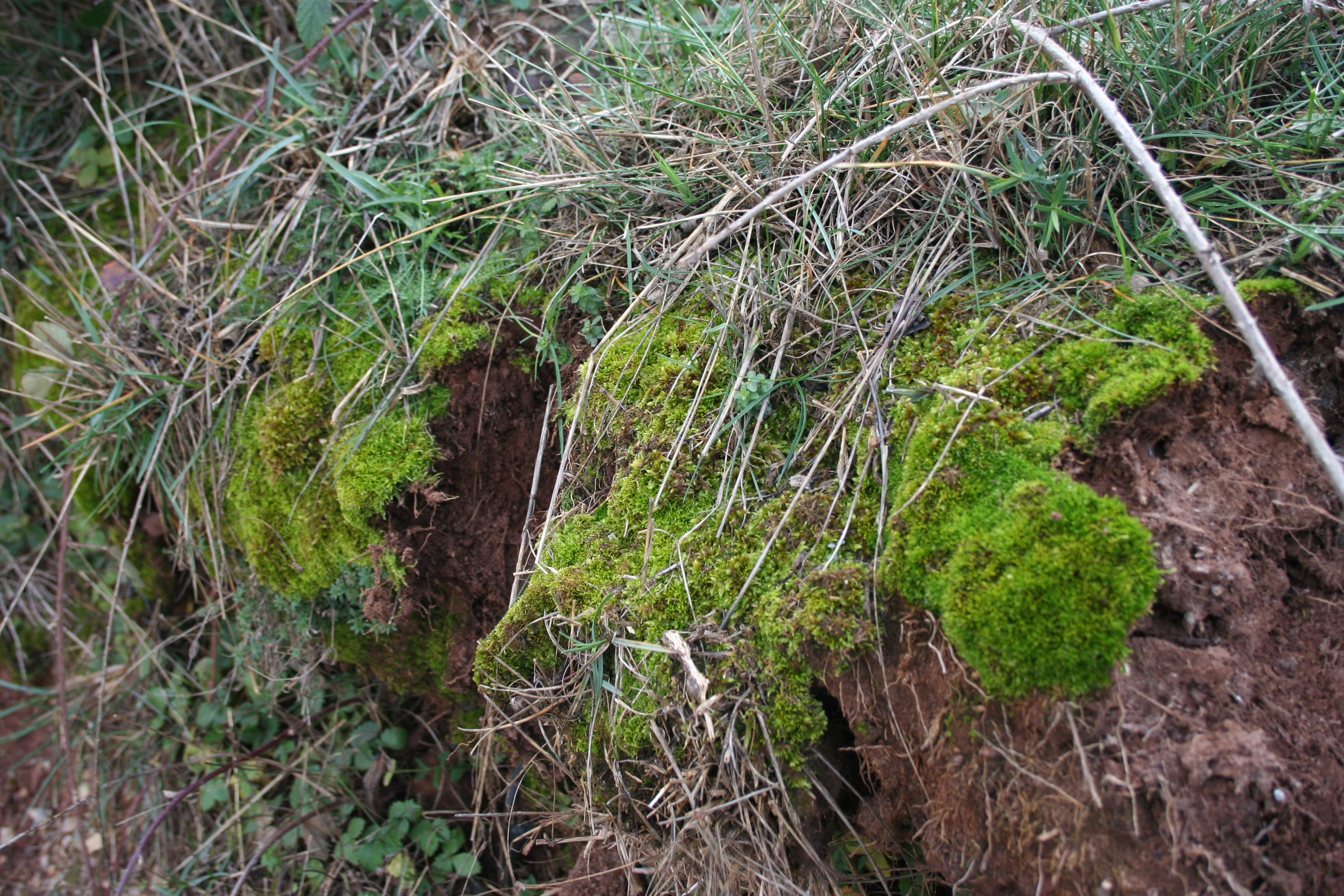 Muestra de musgo.